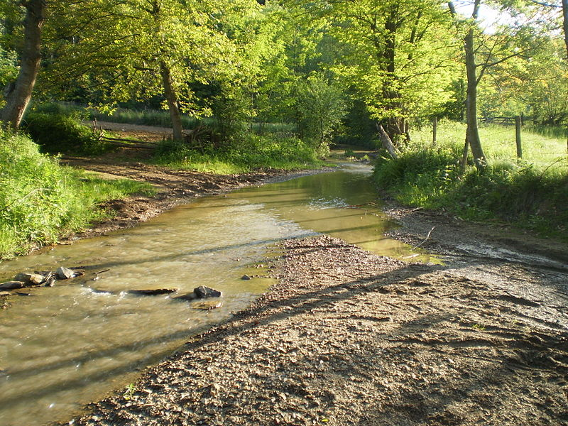 Reka u Gornjoj Trešnjevici.